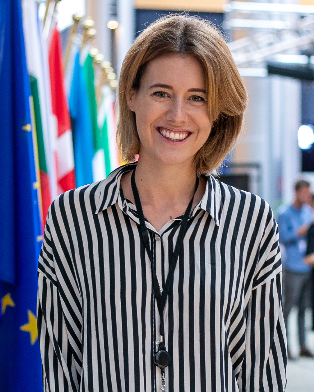 Claudia Gamon im Europäischen Parlament in Straßburg